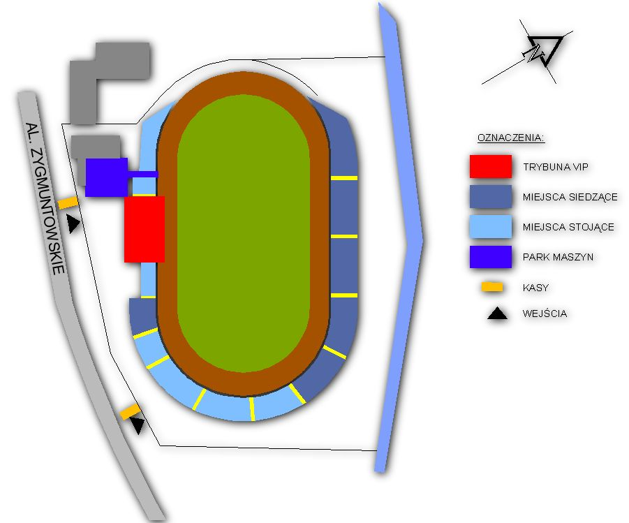 Stadion MOSiR Bystrzyca w Lublinie